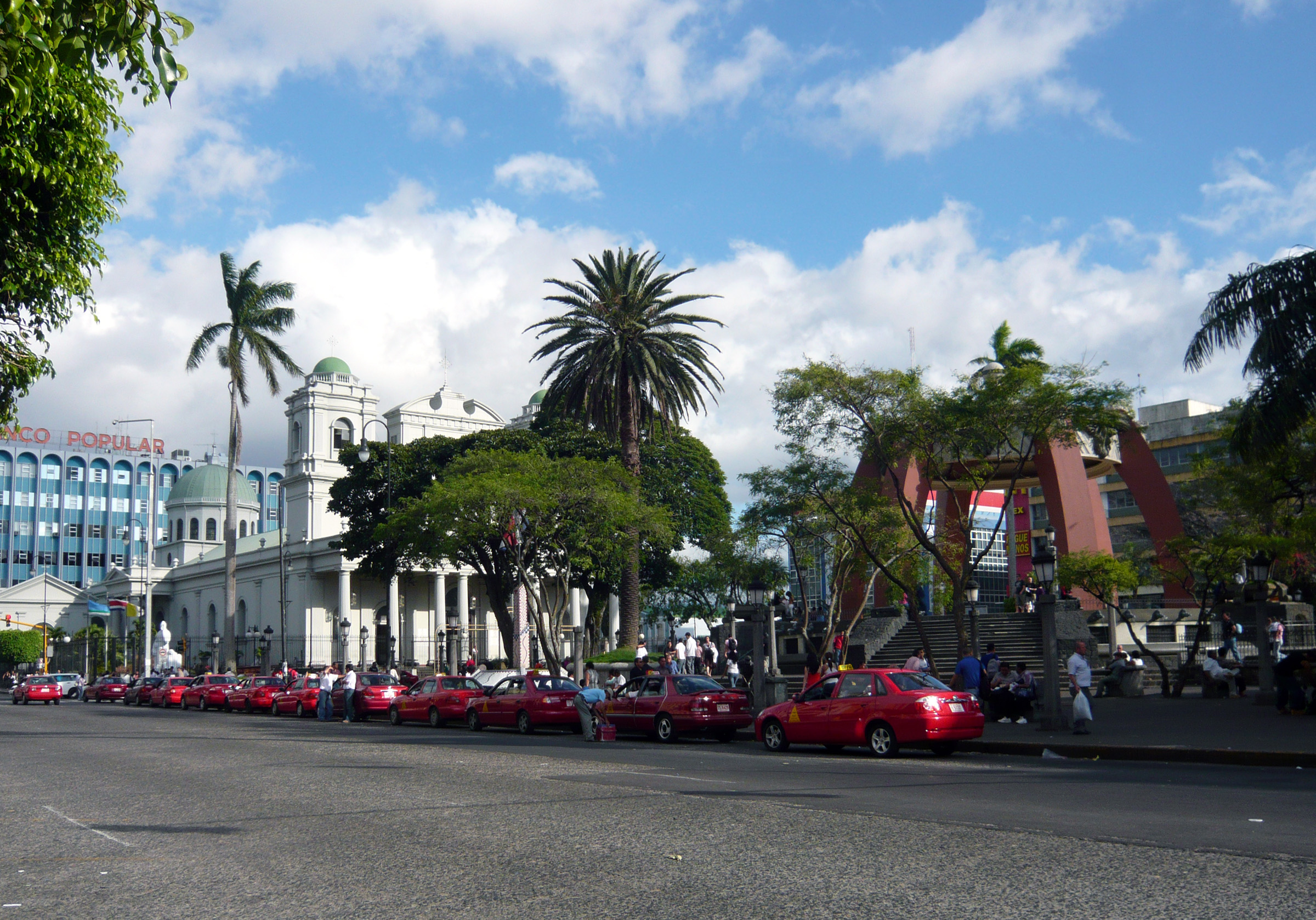 Taxier i Avenida 2 foran katedralen i San José i Costa Rica